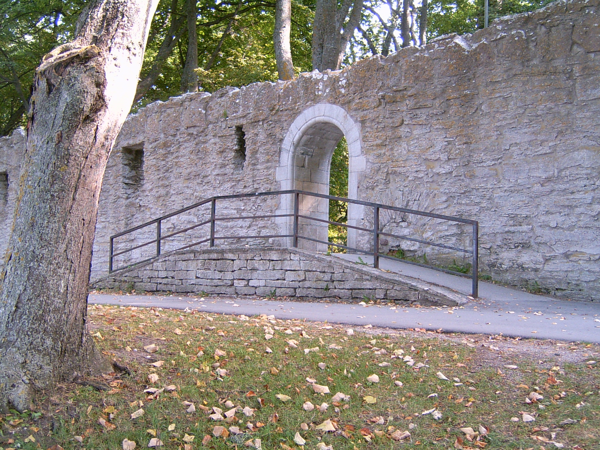 "The Lovegate" (Kärleksporten) in Visby.